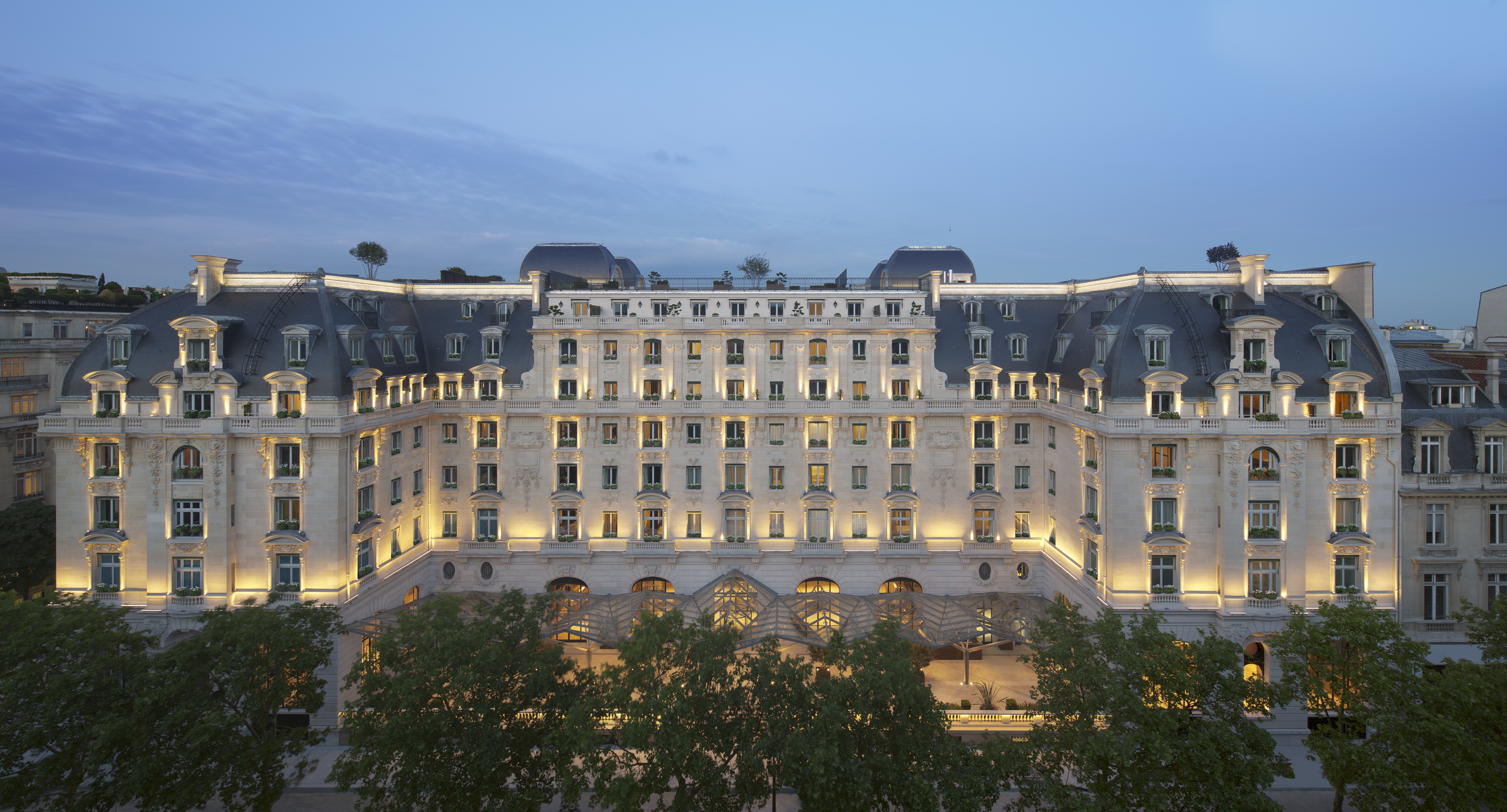 Façade de l'hôtel Peninsula, ancien hôtel Majestic, avenue Kléber, Paris, France.